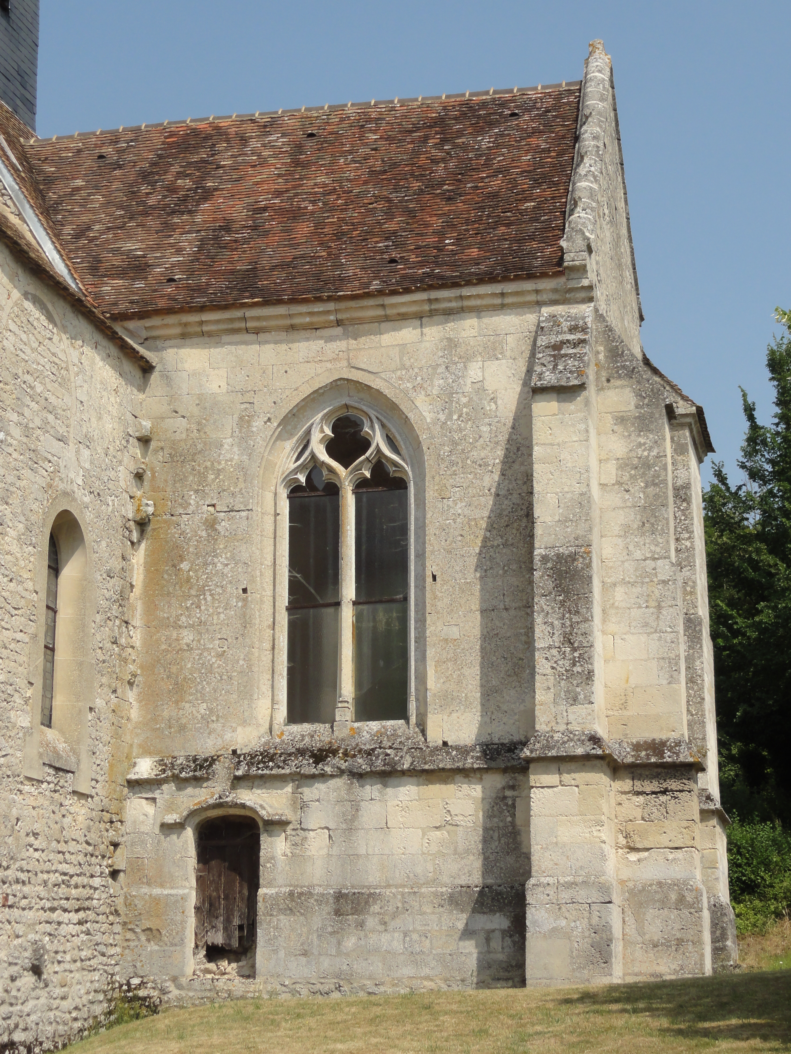 Église Saint-Lucien d'Ansacq (voir titre).